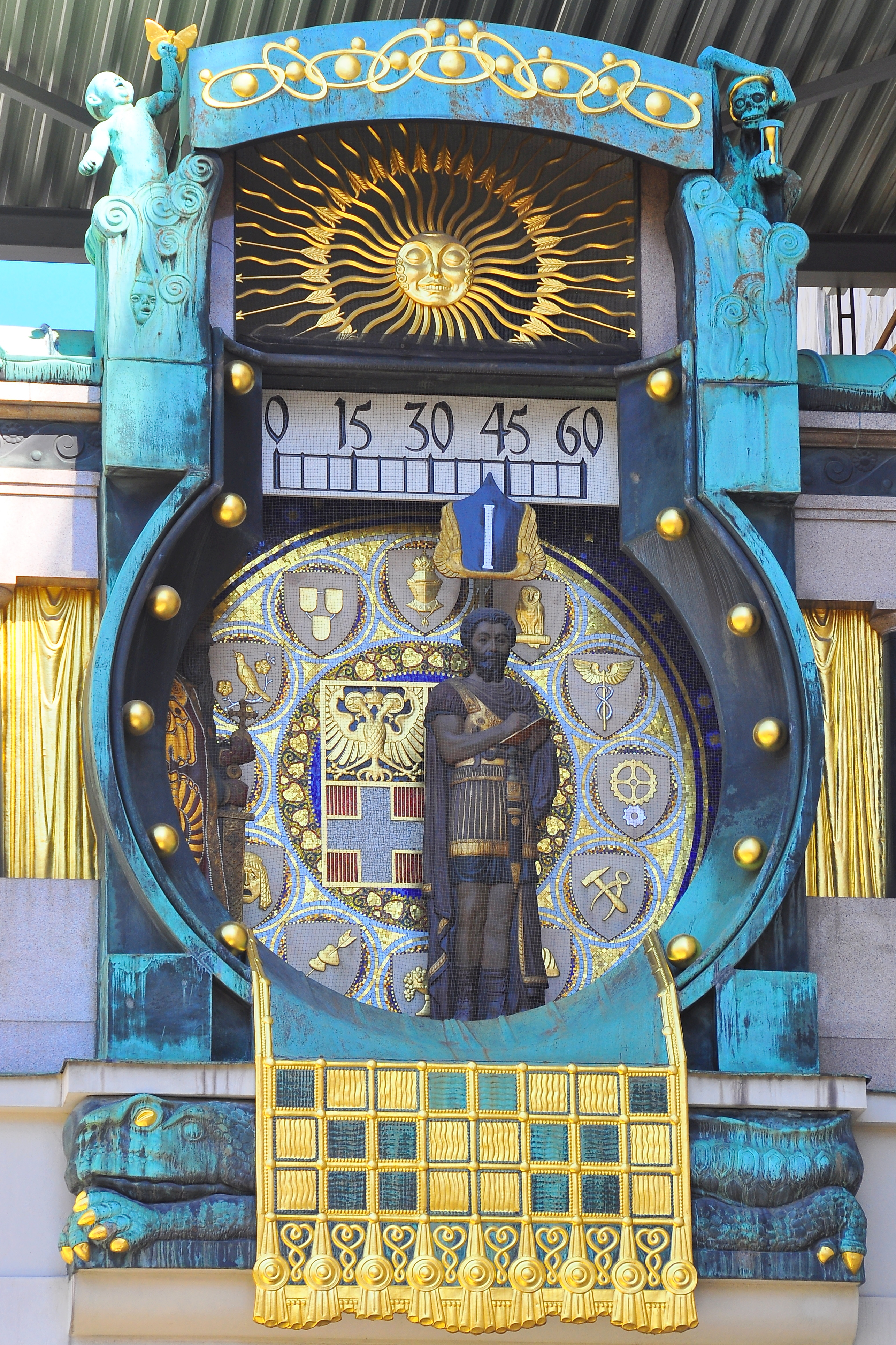 Anker-Uhr, Hoher Markt, ehemalige Ankerversicherung, heute Helvetia